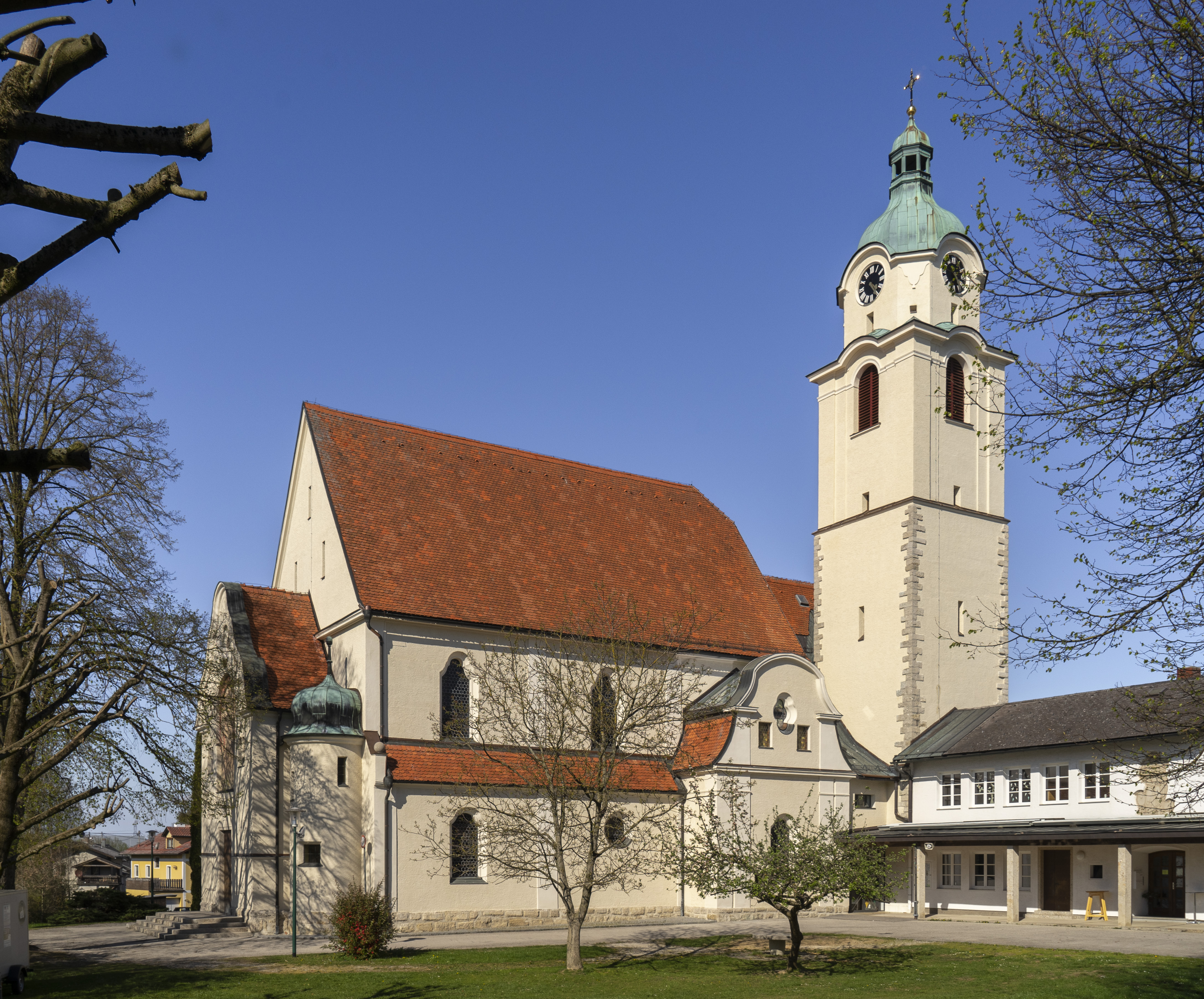 Kath. Pfarrkirche hl. Stephanus